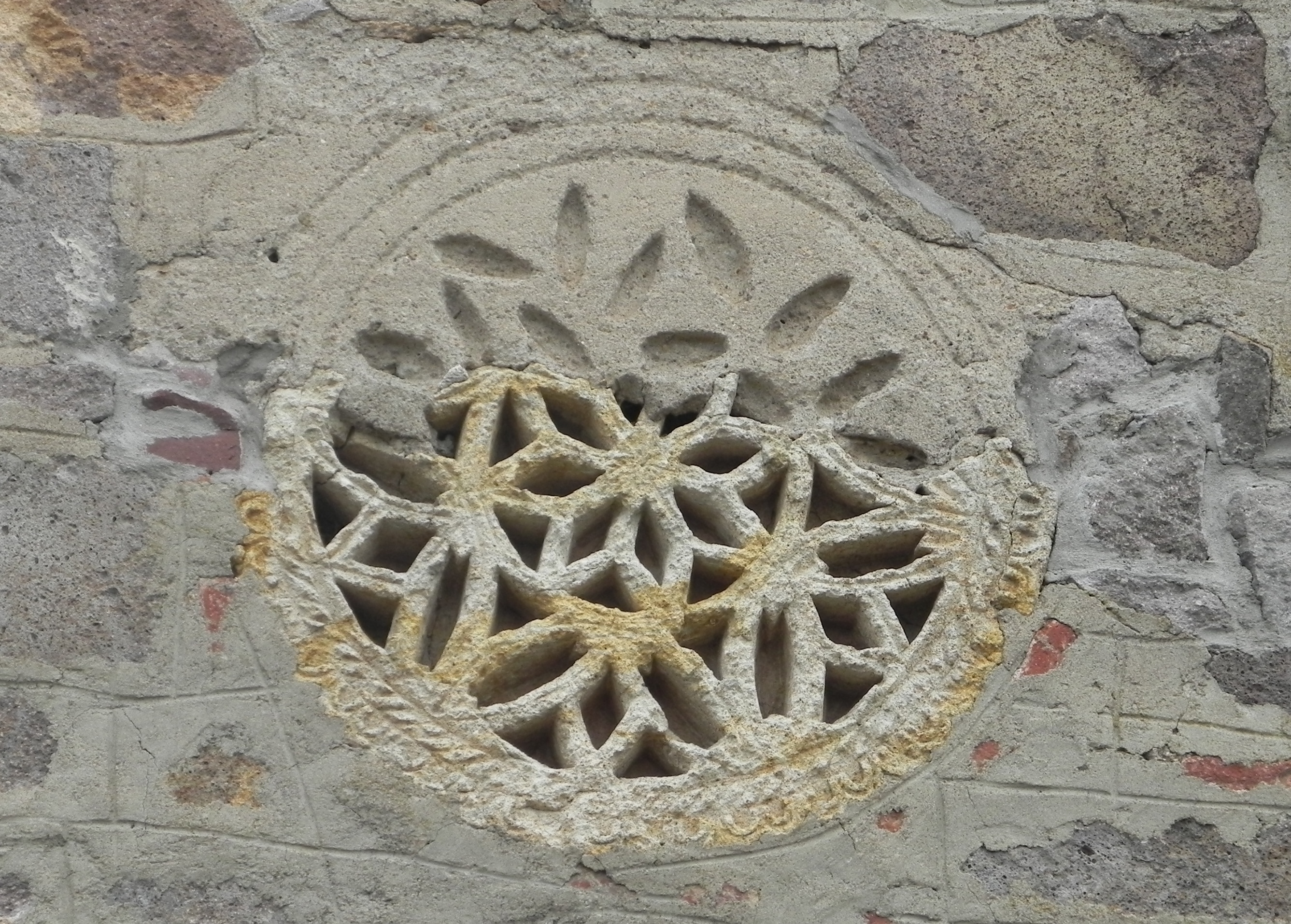 Detal me motive florale na fasaden ballore te monumentit Kishëza ne fshatin Rakinice ne Komunen e Podujevës, Kosovë